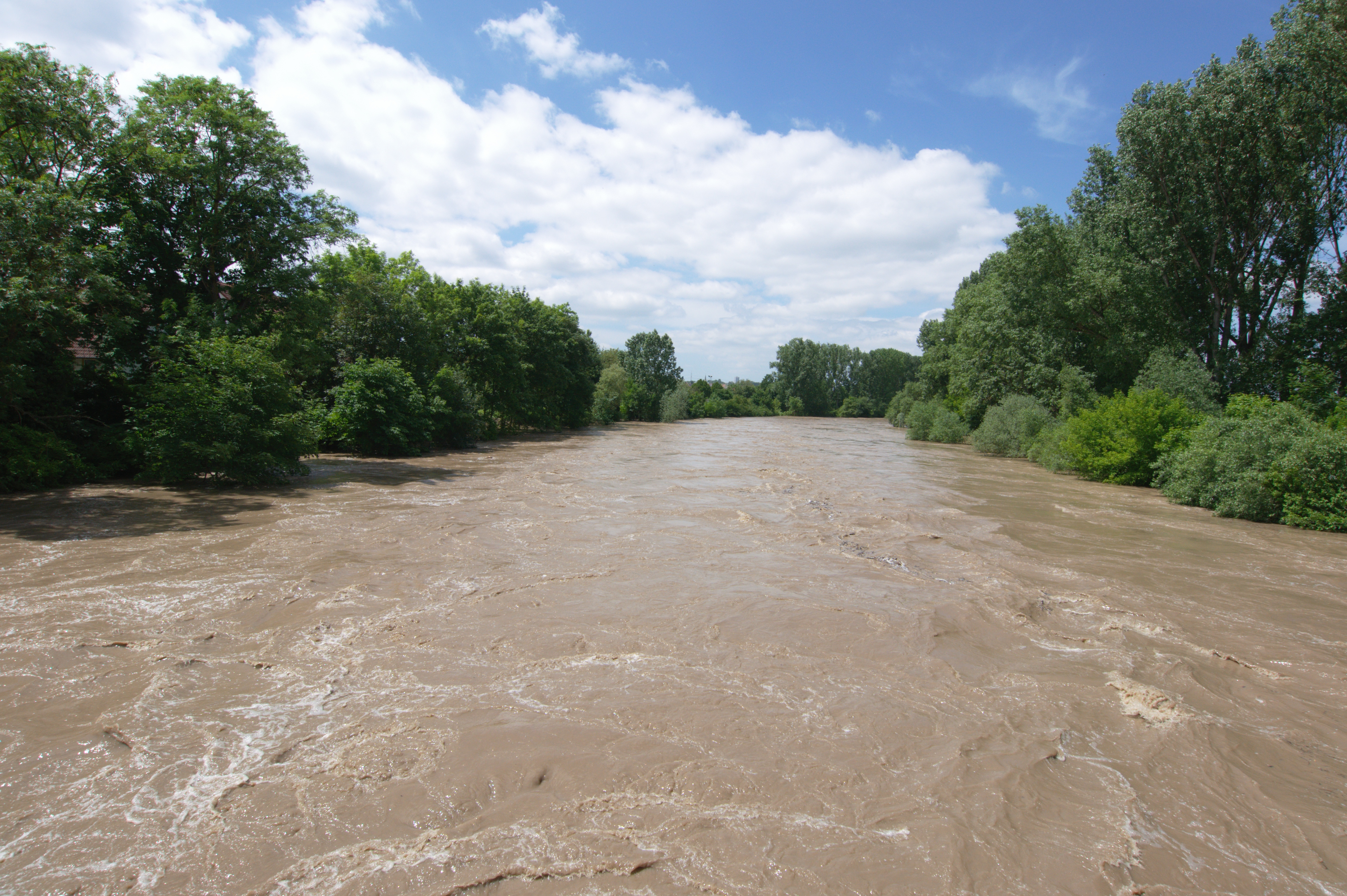 Hochwasser am Altneckar, Neckarbrücke Freiberg